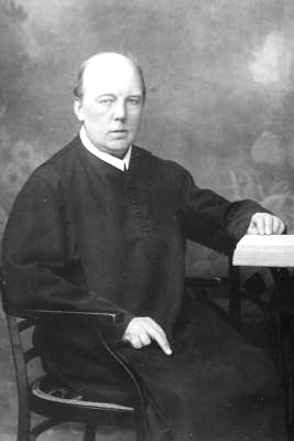 Pater Cölestin Wolfsgruber, Benediktiner, Schriftsteller und Historiker